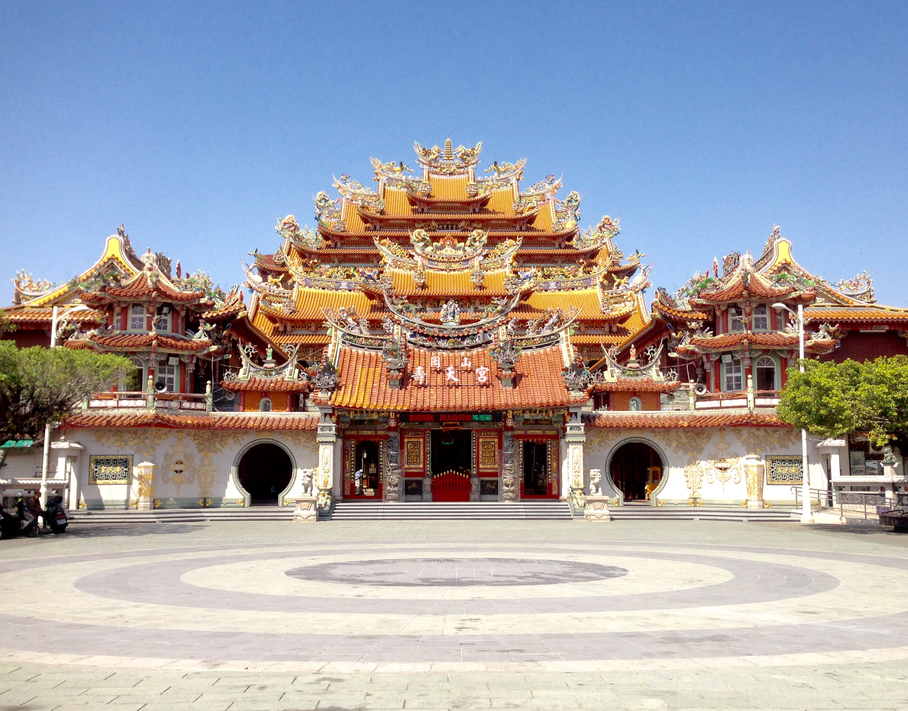 中文（台灣）: 岡山壽天宮